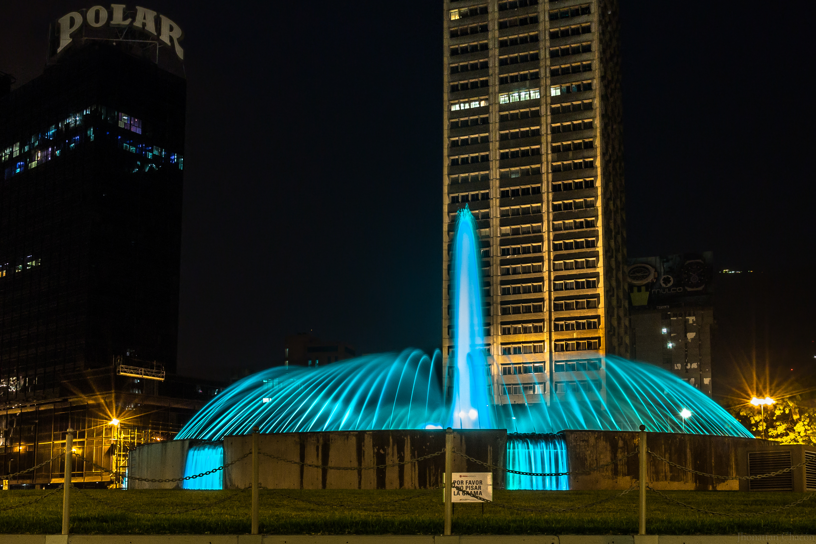 Plaza Venezuela de Noche